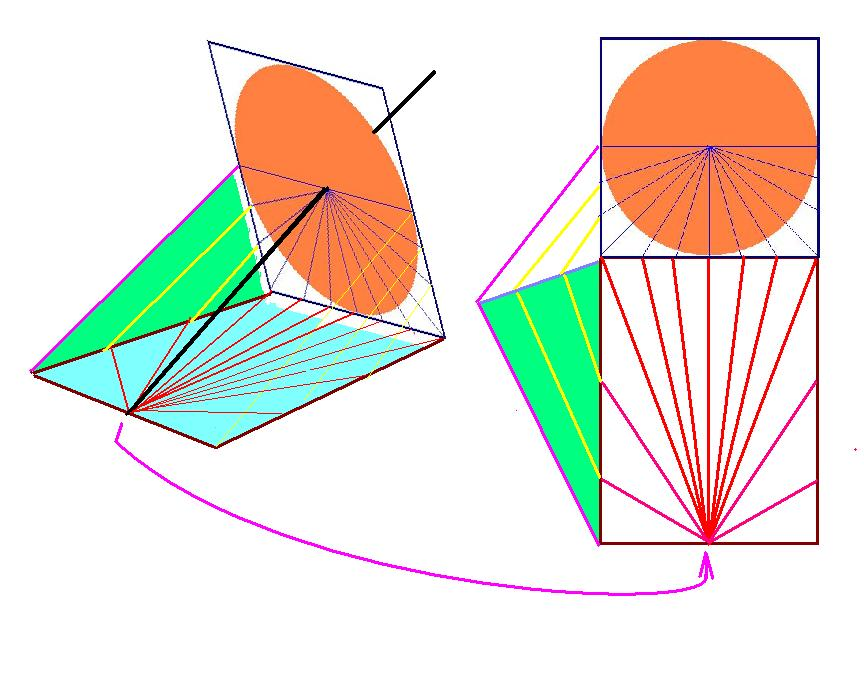 コマ型日時計の目盛りから水平型日時計の目盛りを得るための作図方法。